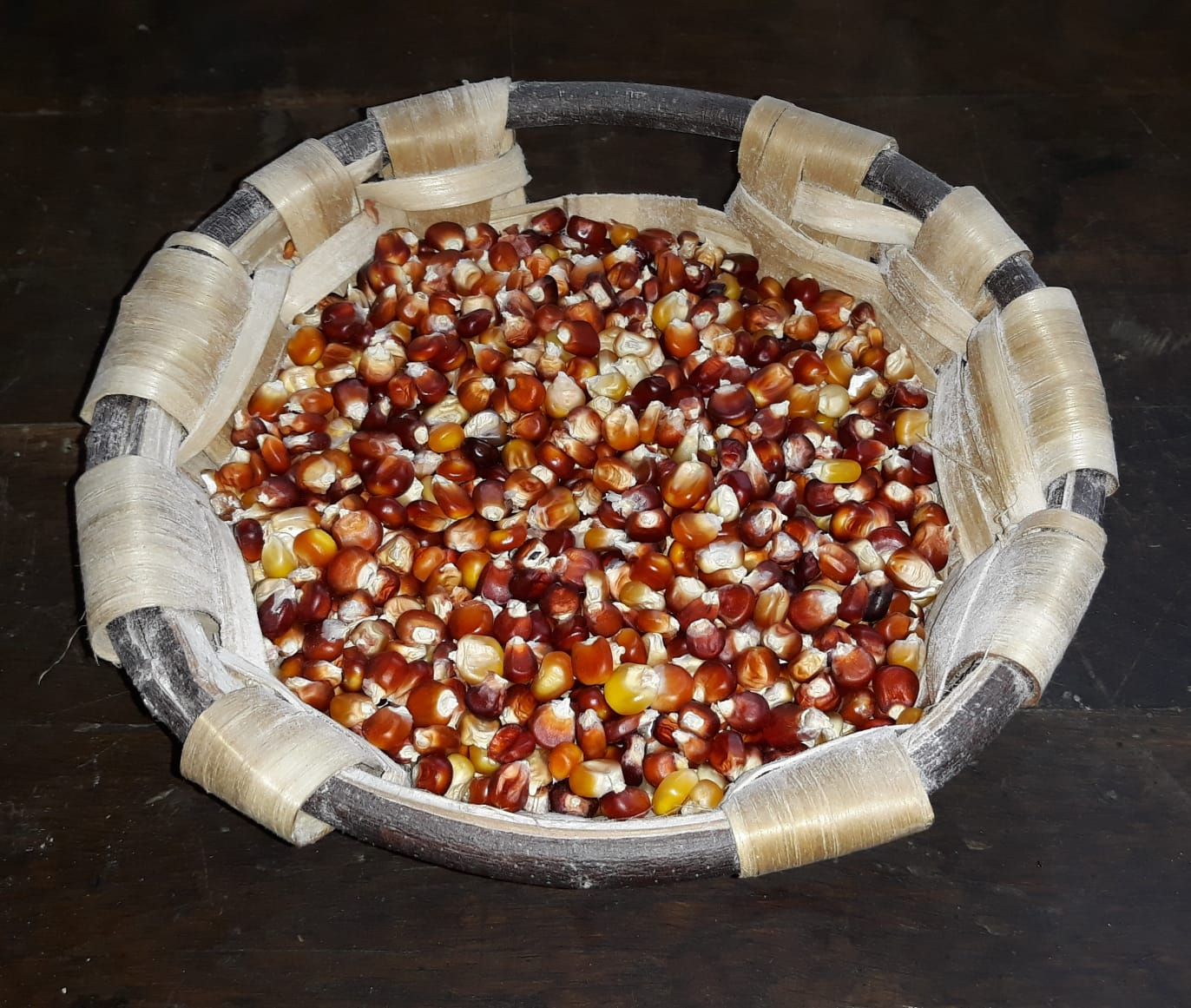 Artoa